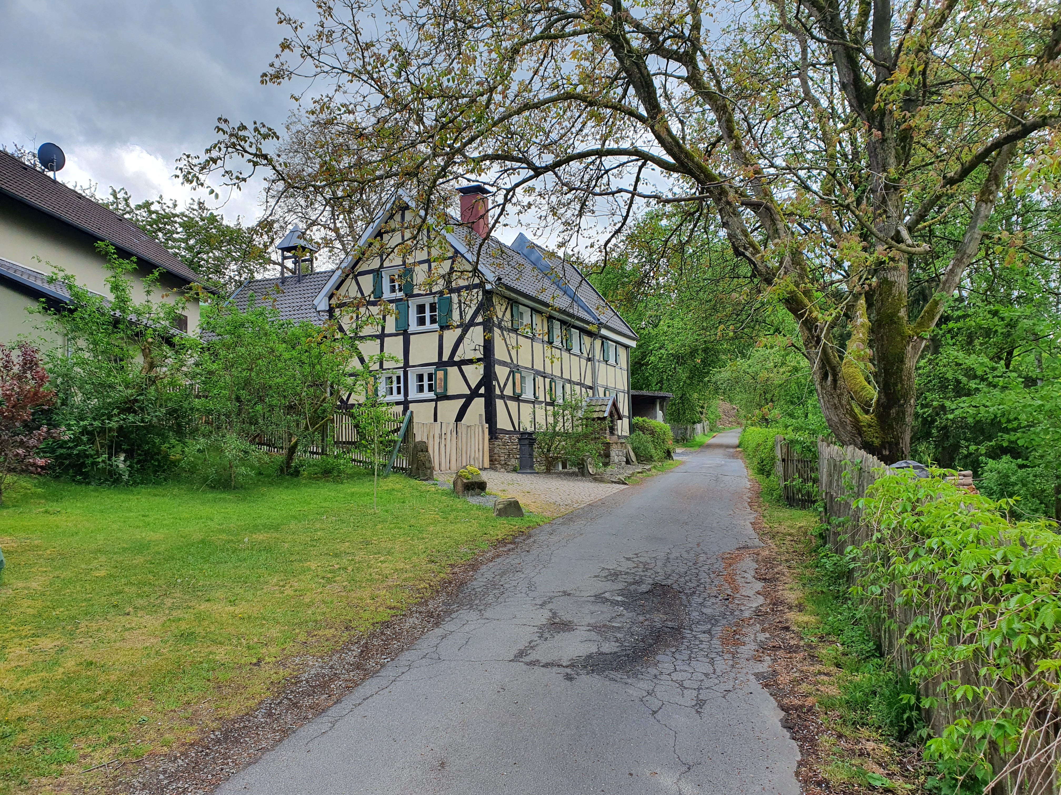 Blick auf den ehemaligen Ruppichterother Ortsteil Buch (heute Teil des Zentralortes).